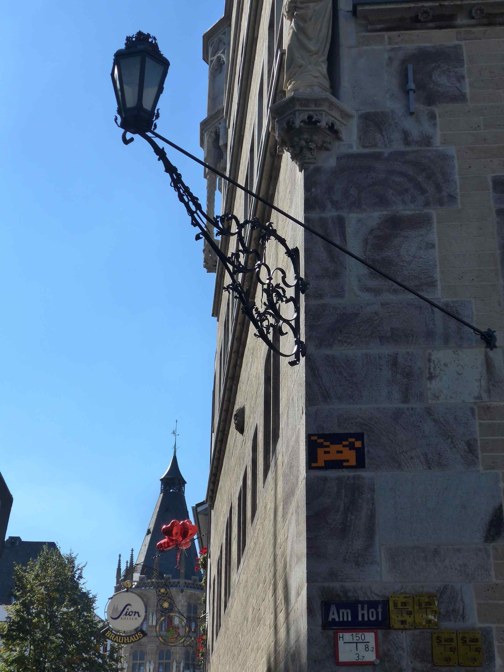 Haus Saaleck, Am Hof 50, Blickrichtung Unter Taschenmacher, Kölner Rathausturm This is a photograph of an architectural monument.